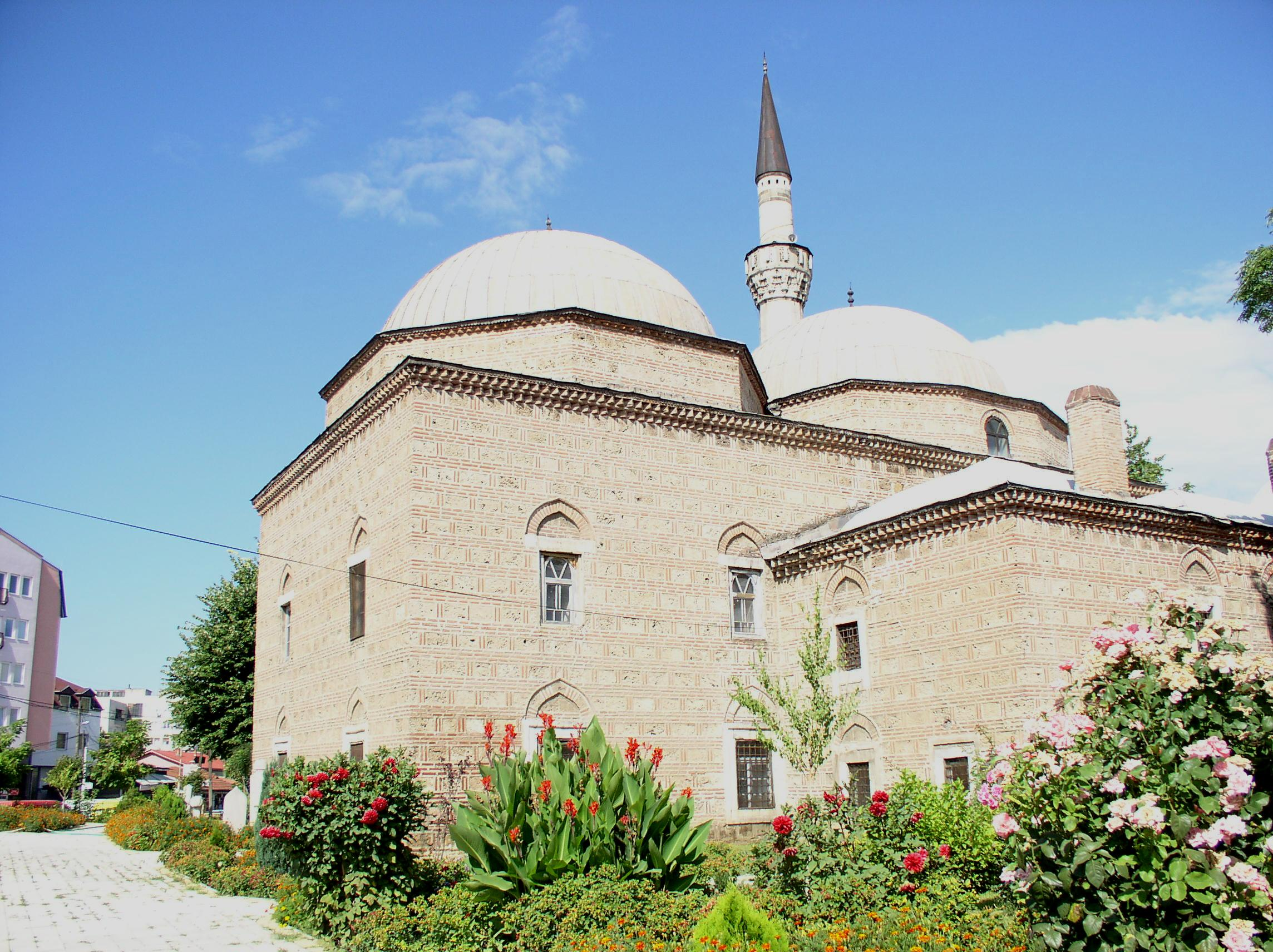 Ishak-begova džamija u Skoplju, Makedonija